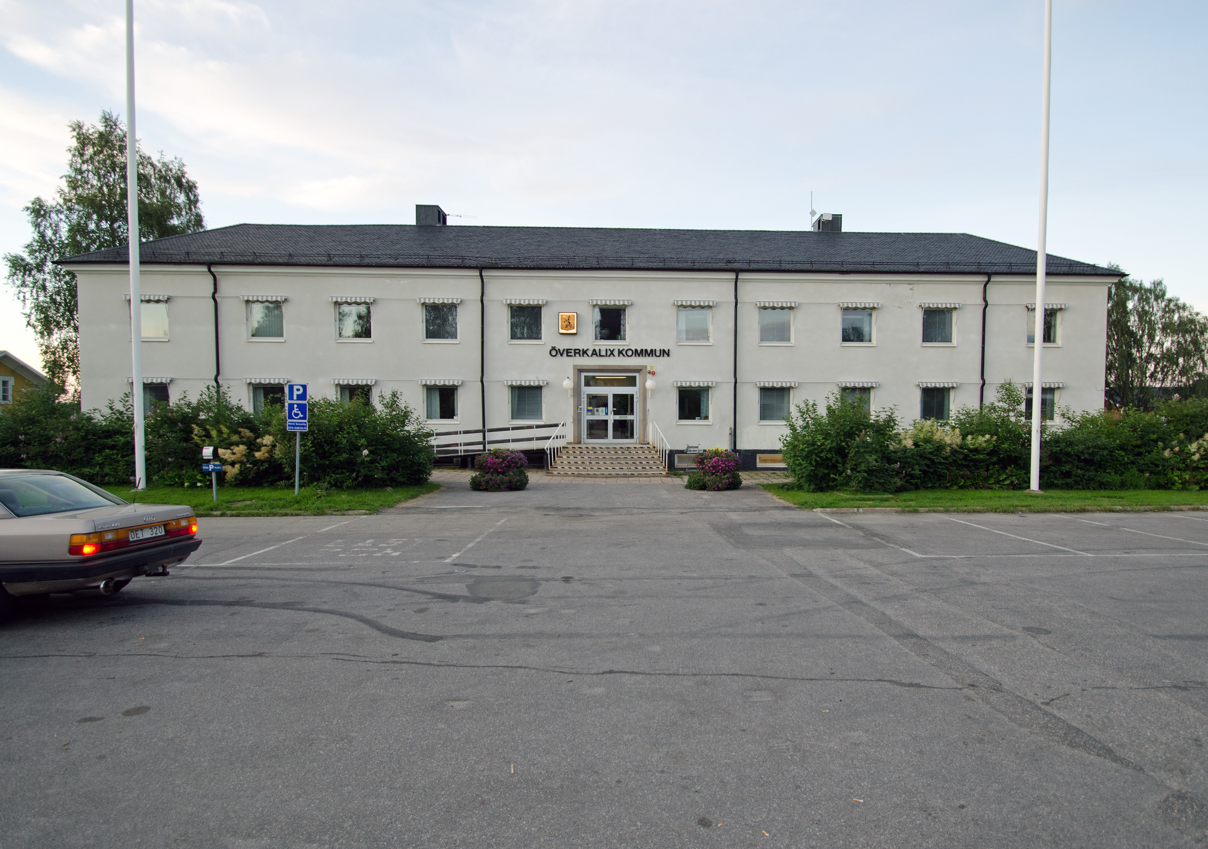 Överkalix